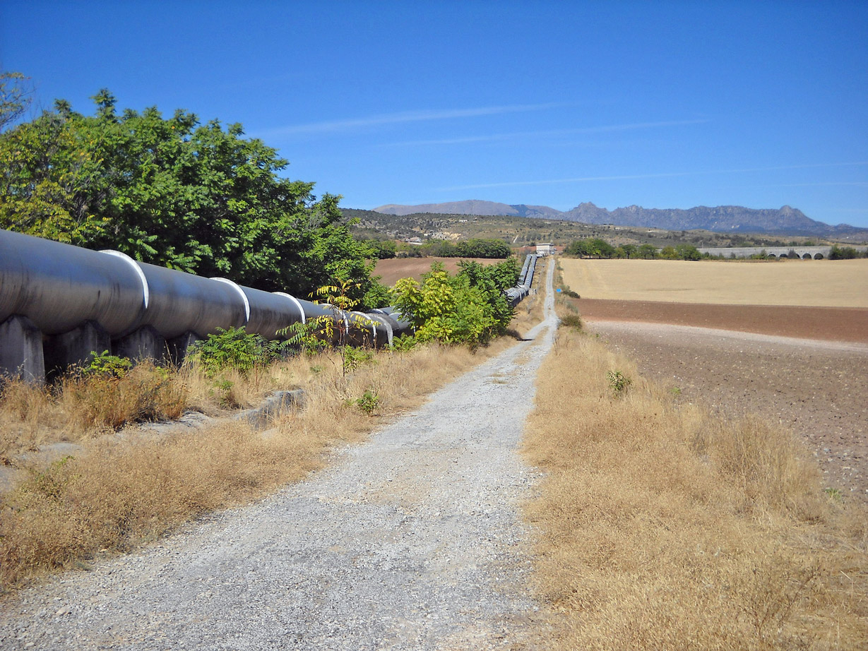 Sifón de los Yesos. Almenara del Empalme entre el Canal Bajo y el canal de El Villar